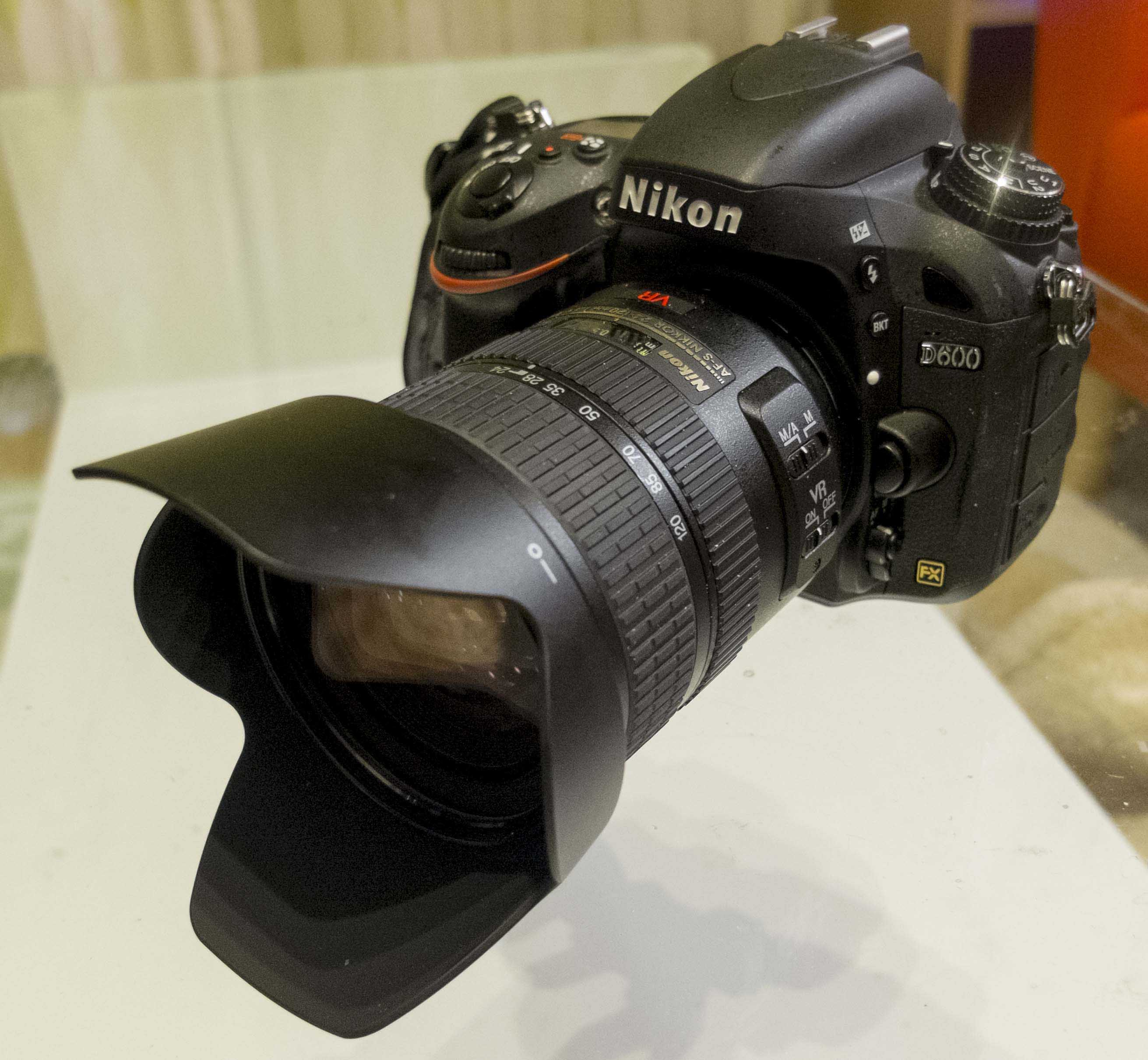 D600の外観